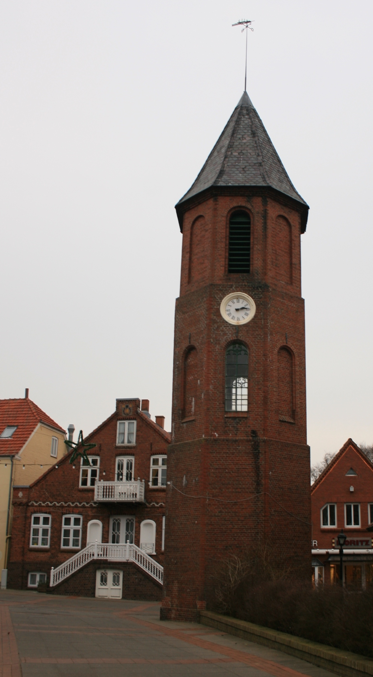 Der Glockenturm in Wyk an der Ecke Große Straße/ Mittelstraße